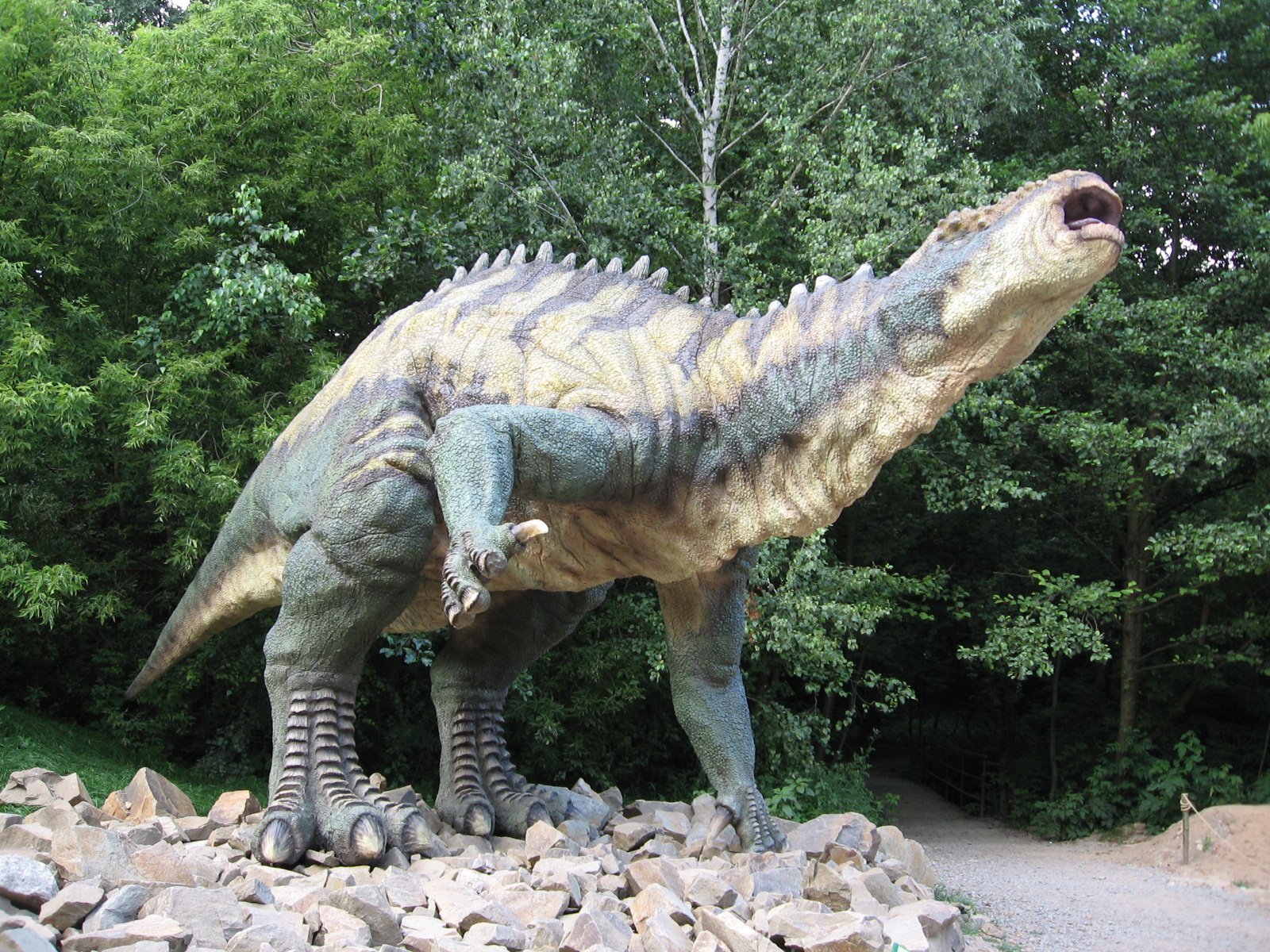 prehist. 04 Troodon(dinopark vyškov cz.)